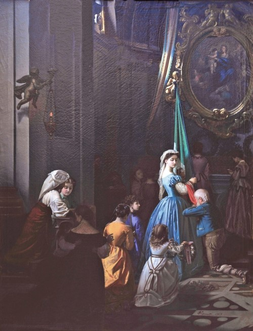 La preghiera delle donne italiche per l'annessione di Roma all'Italia, olio su tela, cm. 132 x 101, coll. privata